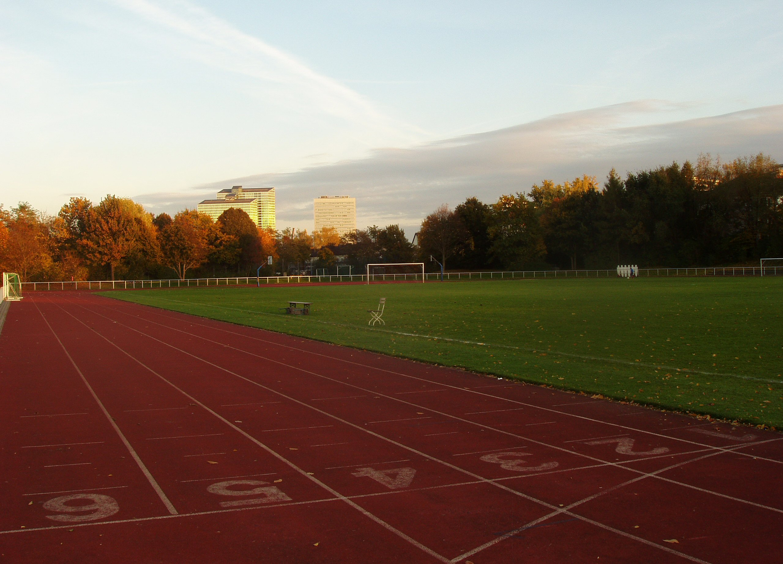 München, TSV Milbertshofen, Fußballplatz mit "Higlight-Towers" und "Münchner Tor"